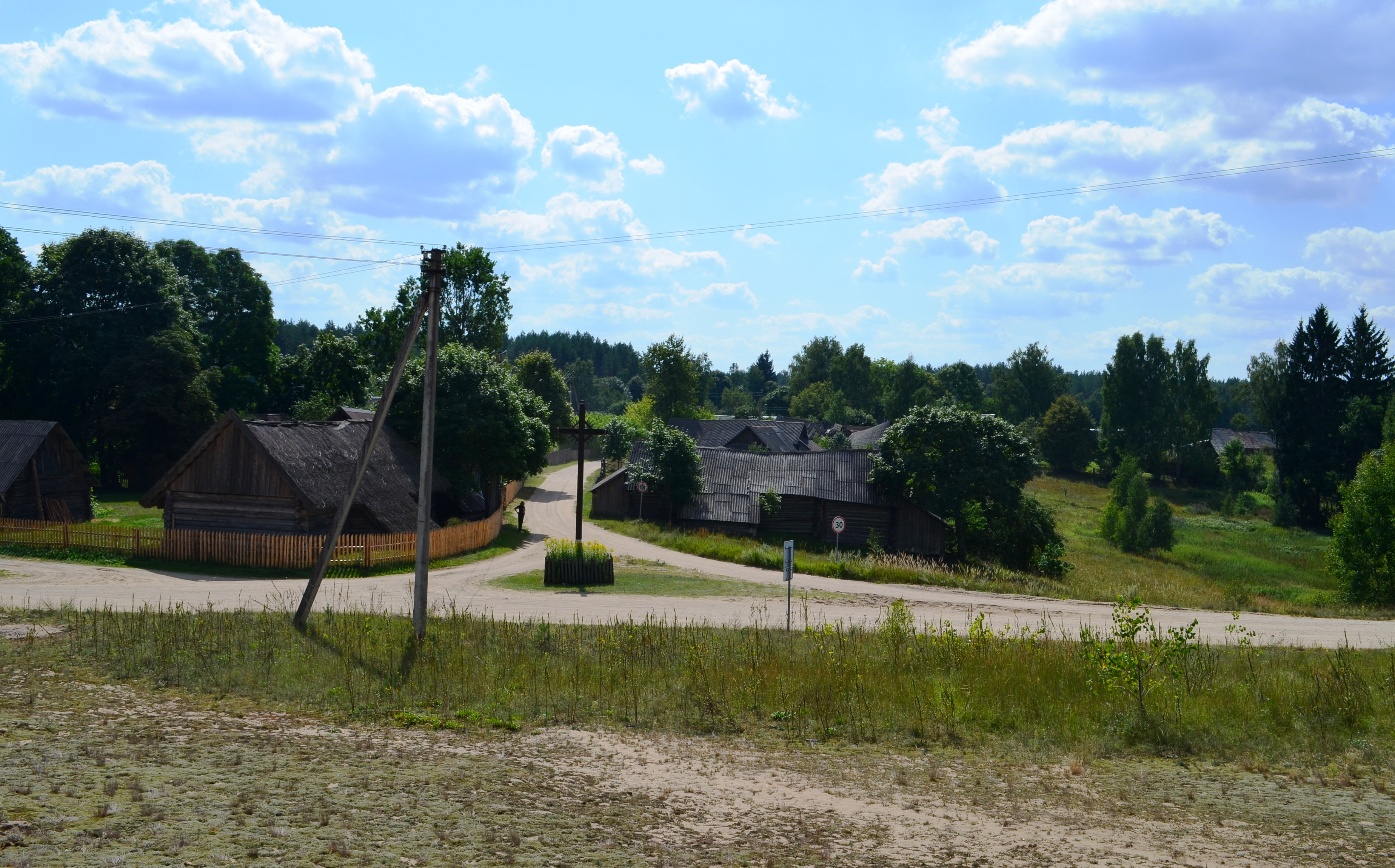 Zervynos, Dzūkijos NP, Varėnos raj. Vaizdas nuo kapinių